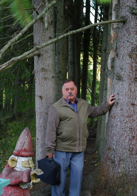 Карпун Юрий Николаевич (1944—2017) — советский и российский ботаник-дендролог